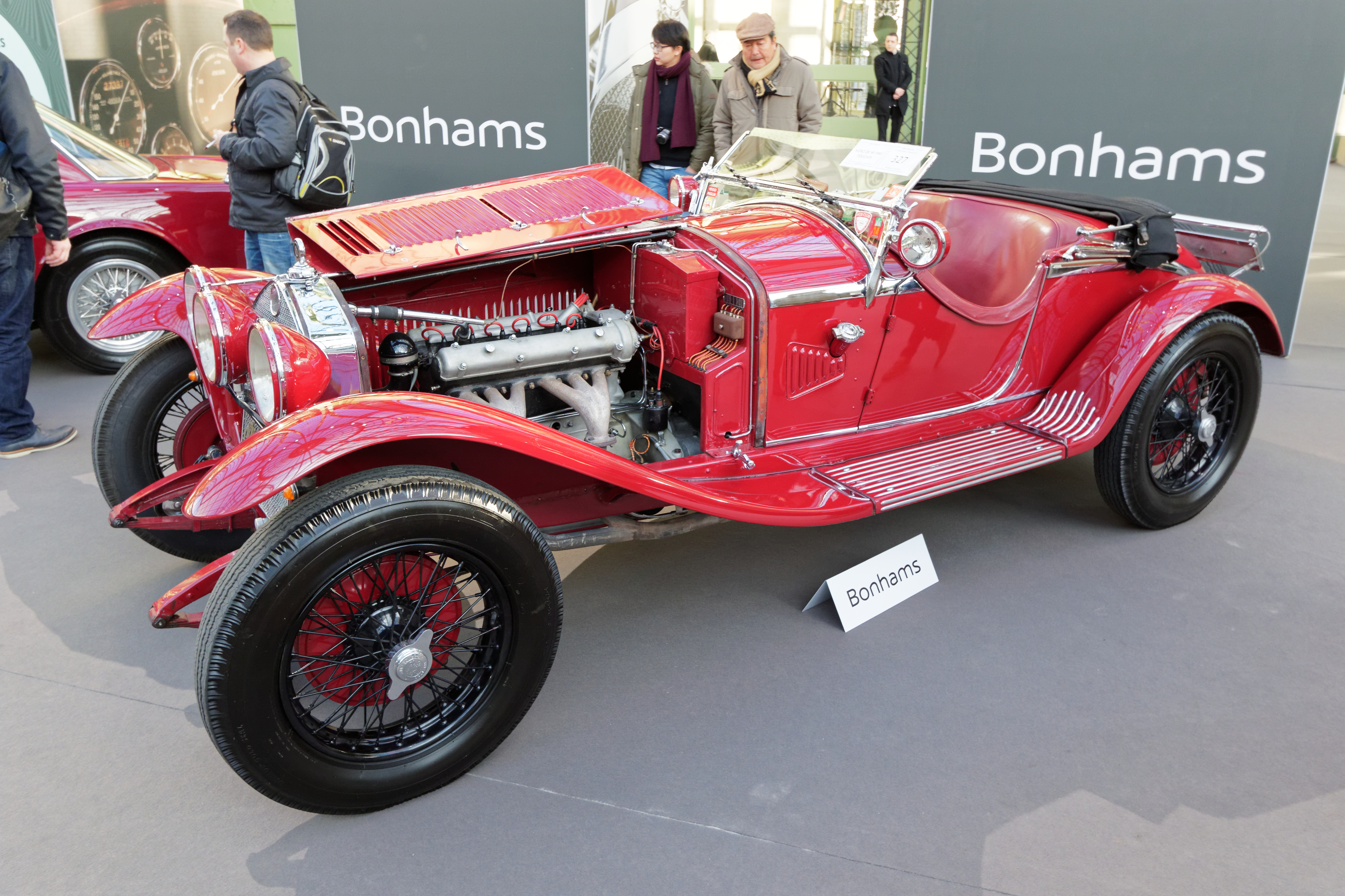 Un des véhicules présenté lors de la vente aux enchères Bonhams 2015 au Grand Palais de Paris.